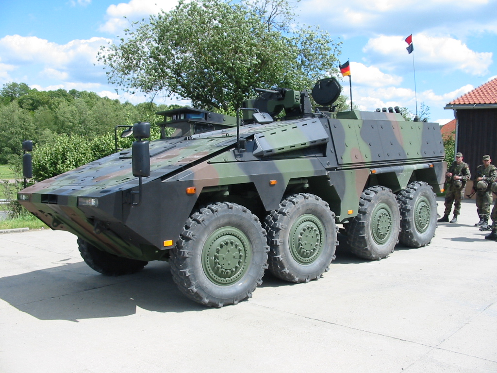 GTK Boxer side